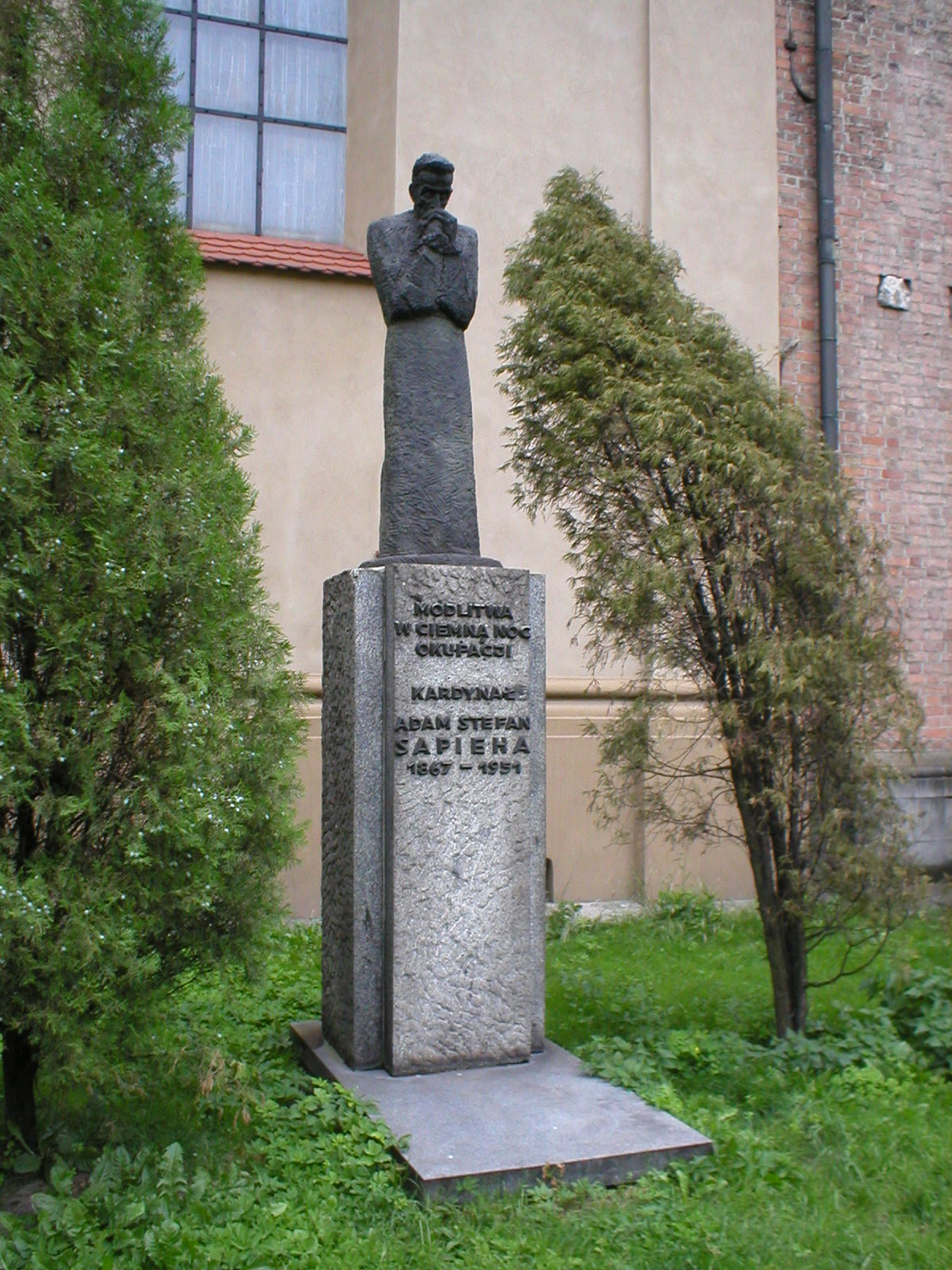 Pomnik kardynała Sapiehy dłuta Augusta Zamoyskiego przy kościele franciszkanów w Krakowie (Adam Sapieha monument by August Zamoyski in Cracow)